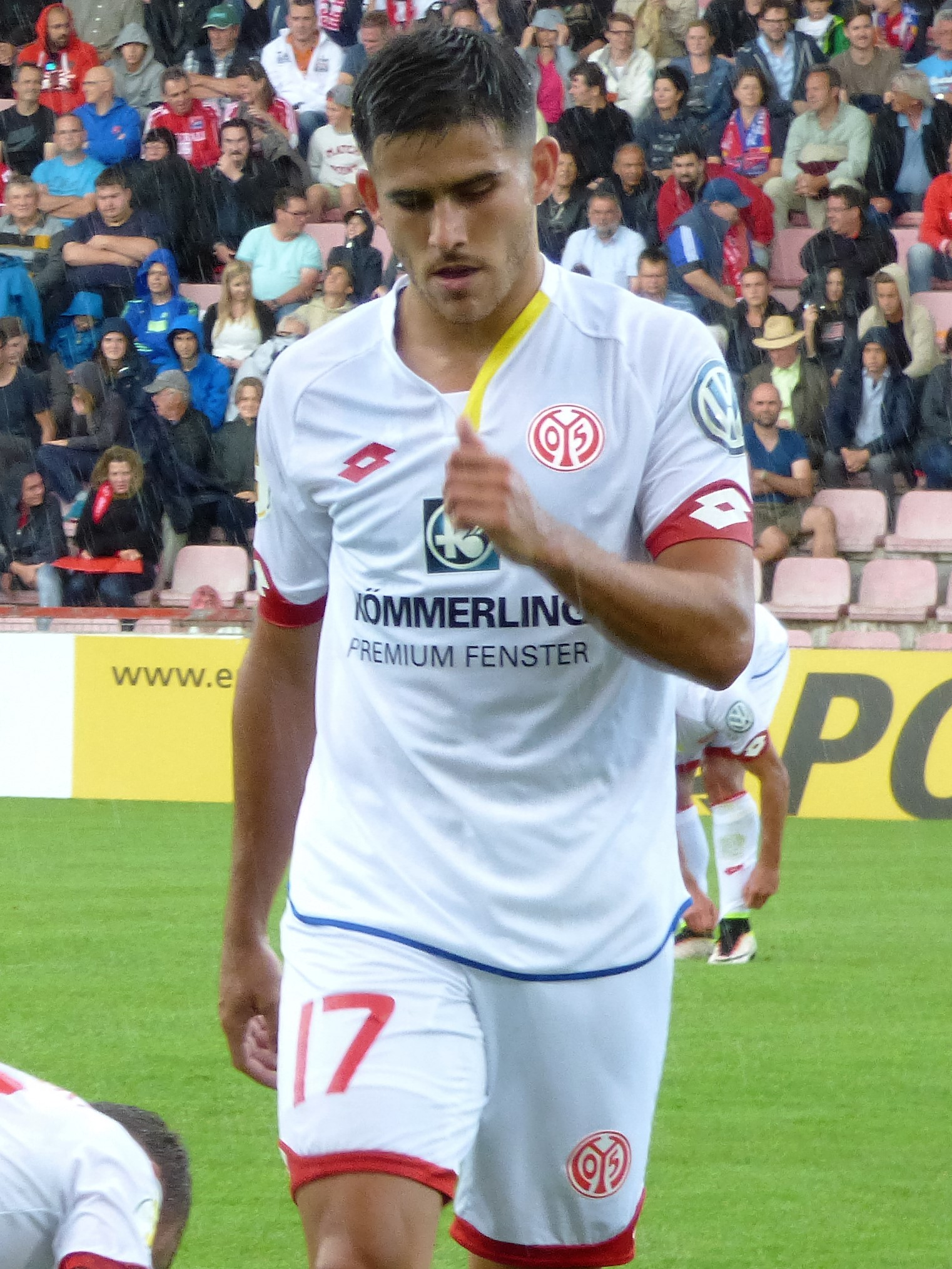 Samperio, Jairo Mainz 16-17